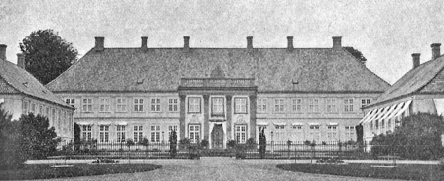 Juelsberg var krongods til 1669, da det blev købte af Claus Rasch, han kaldet sin nye ejendom for Raschenberg, navnet Juelsberg er fra 1797. Gården ligger i Aunslev Sogn, Vindinge Herred, Nyborg Kommune. Hovedbygningen er opført i 1771-1786.